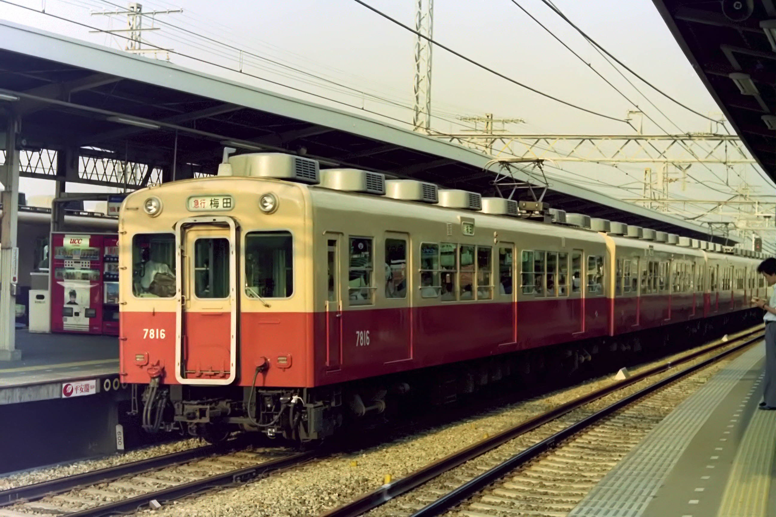 阪神電気鉄道7801形1次車。